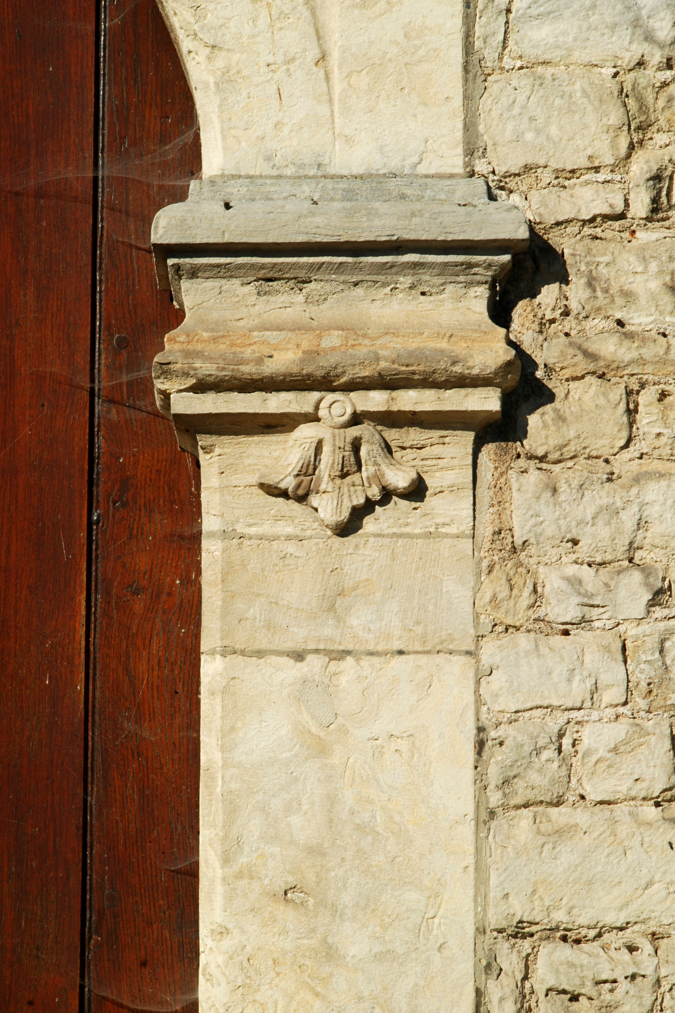 Belgique - Brabant wallon - Jodoigne - Saint-Remy-Geest - Église Saint-Remy